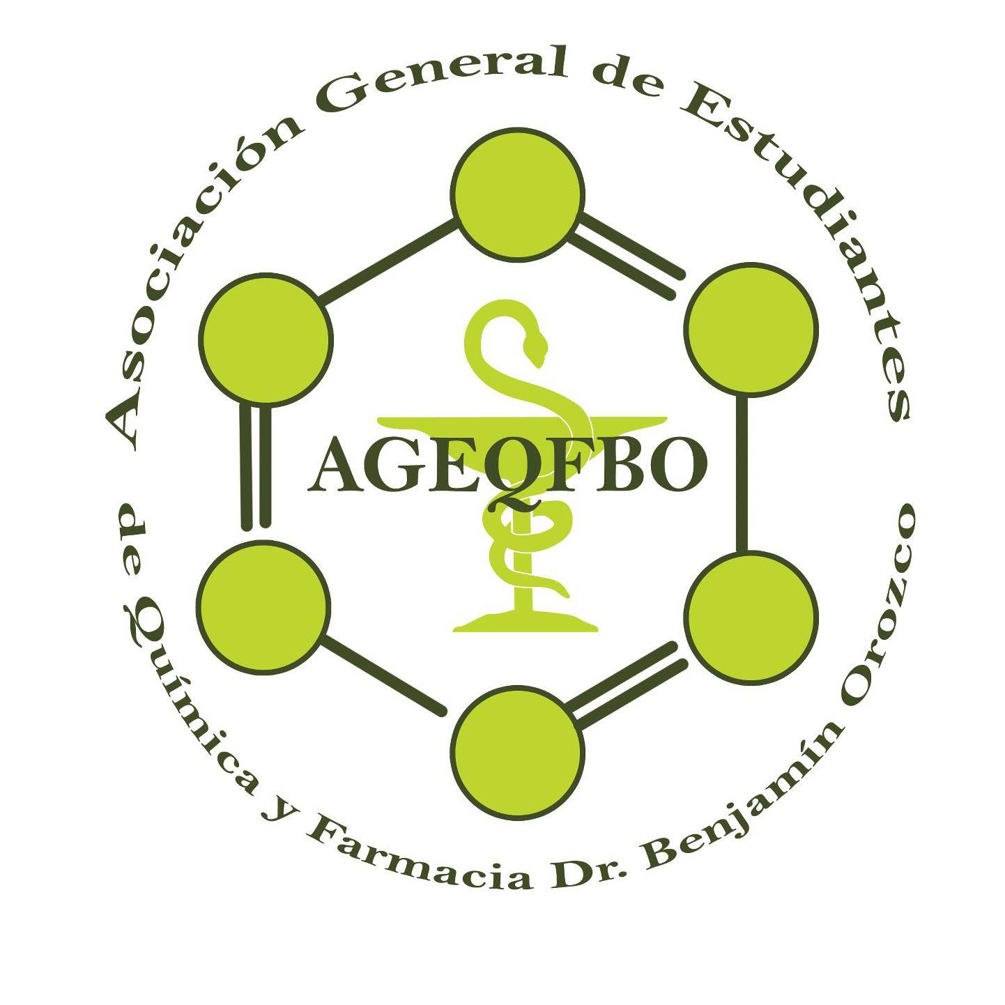 Logotipo de la Asociación General de Estudiantes de Química y Farmacia "Dr. Benjamín Orozco" (AGEQF-BO) de la Universidad de El Salvador